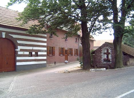 Limburgs: Aolbaek (Aalbeek) pöthuuske mèt waegkruus 2005